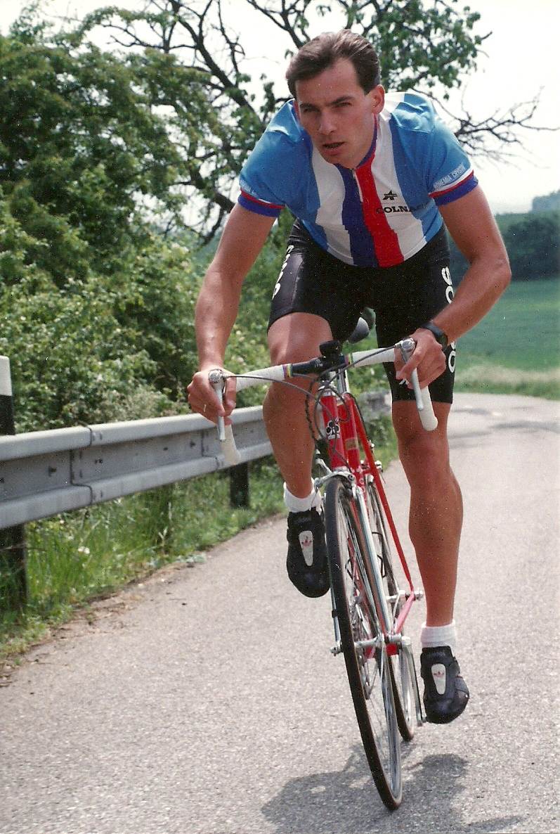 Pavel Soukup v přípravě na OH 1992